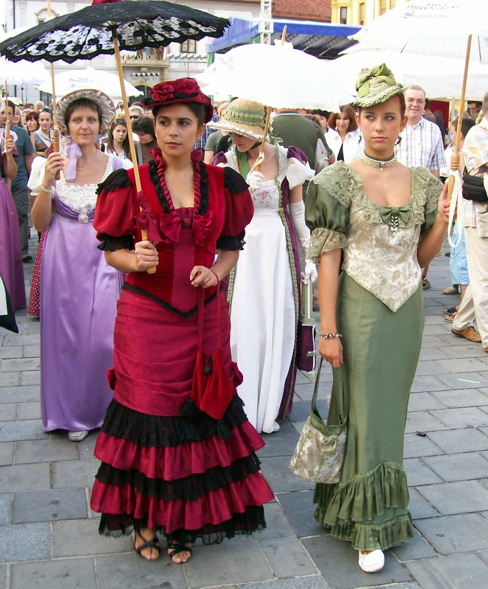 Špancirfest 2008., Varaždin